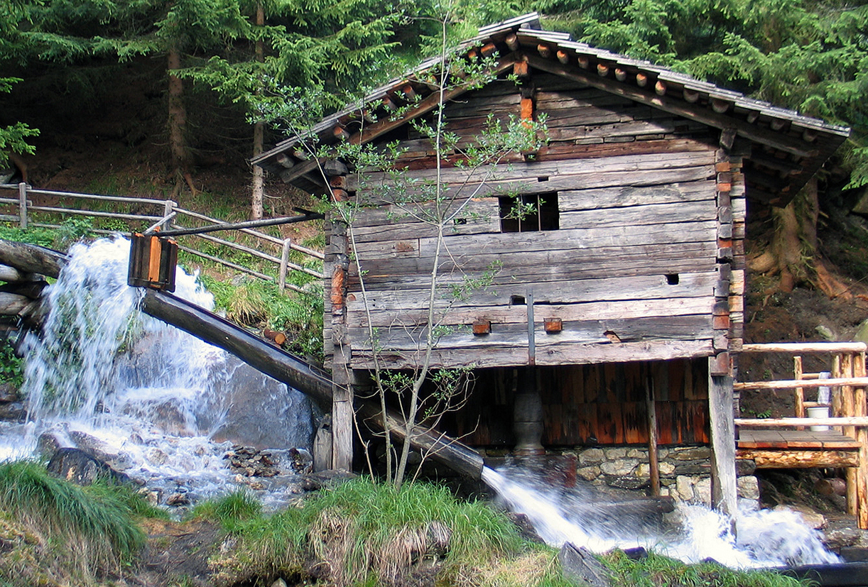 Kalser Stockmühle (Pahl) am Dorferbach